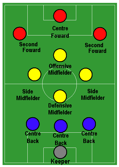 Mia creazione. Modifica degli altri moduli per unificare il font.